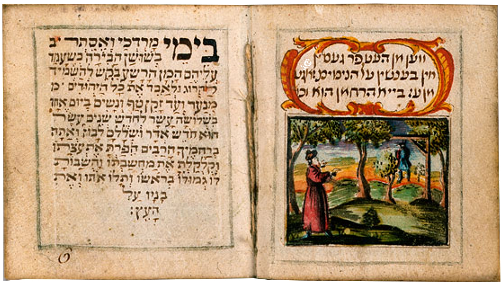 Me'ah Berachot, handgeschriebenes Miniaturgebetbuch; Nachdruck: ISBN 0-948223-14-6